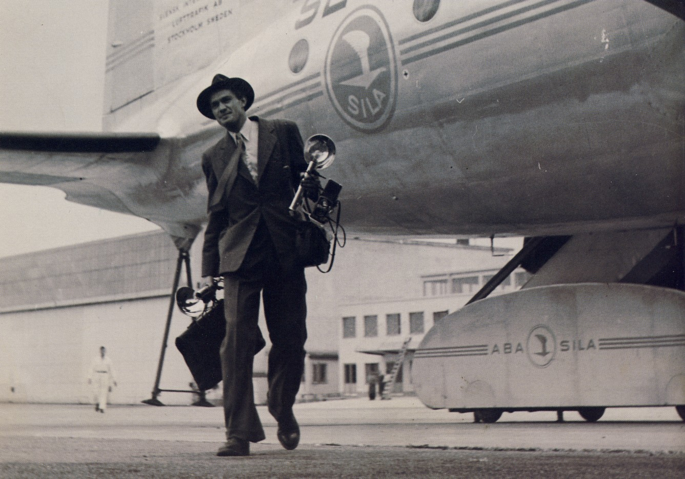 Fotografen Lennart Nilsson på Arlanda 1946